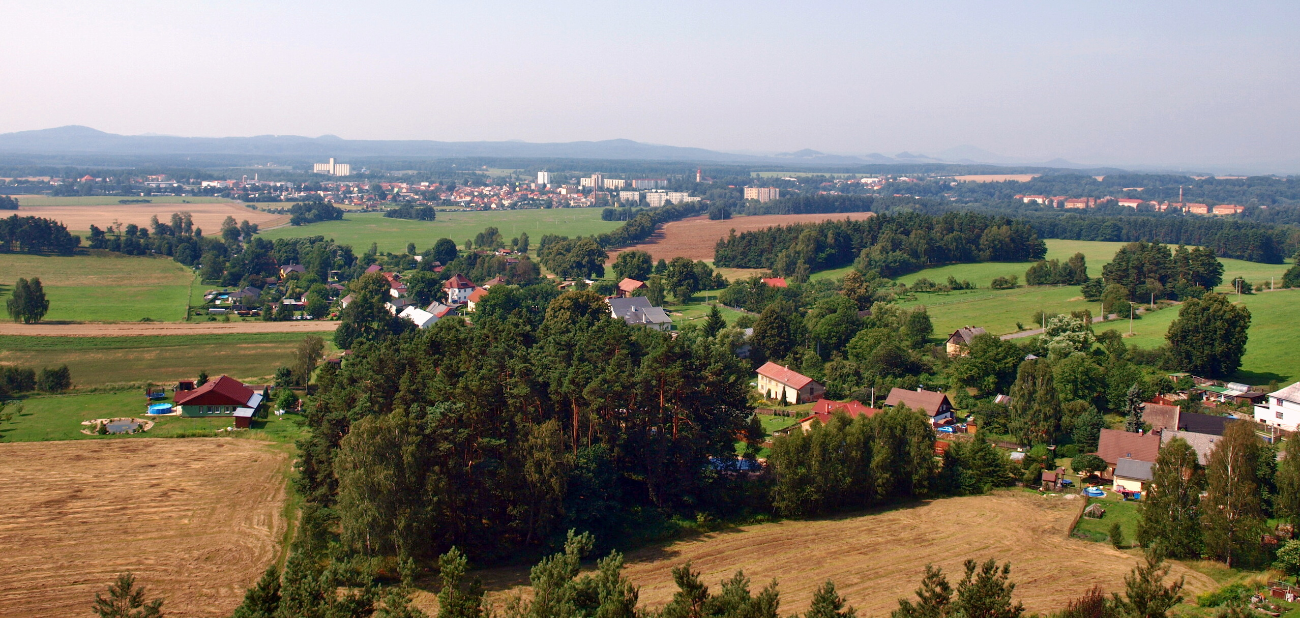 Vranov a Juliina vyhlídka